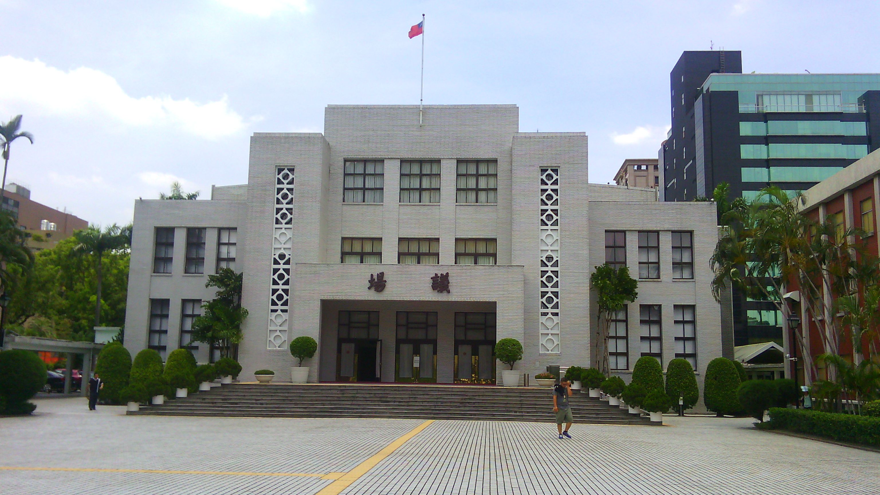 中華民國立法院議場正門 立法院議場 立法院院會三讀會議場